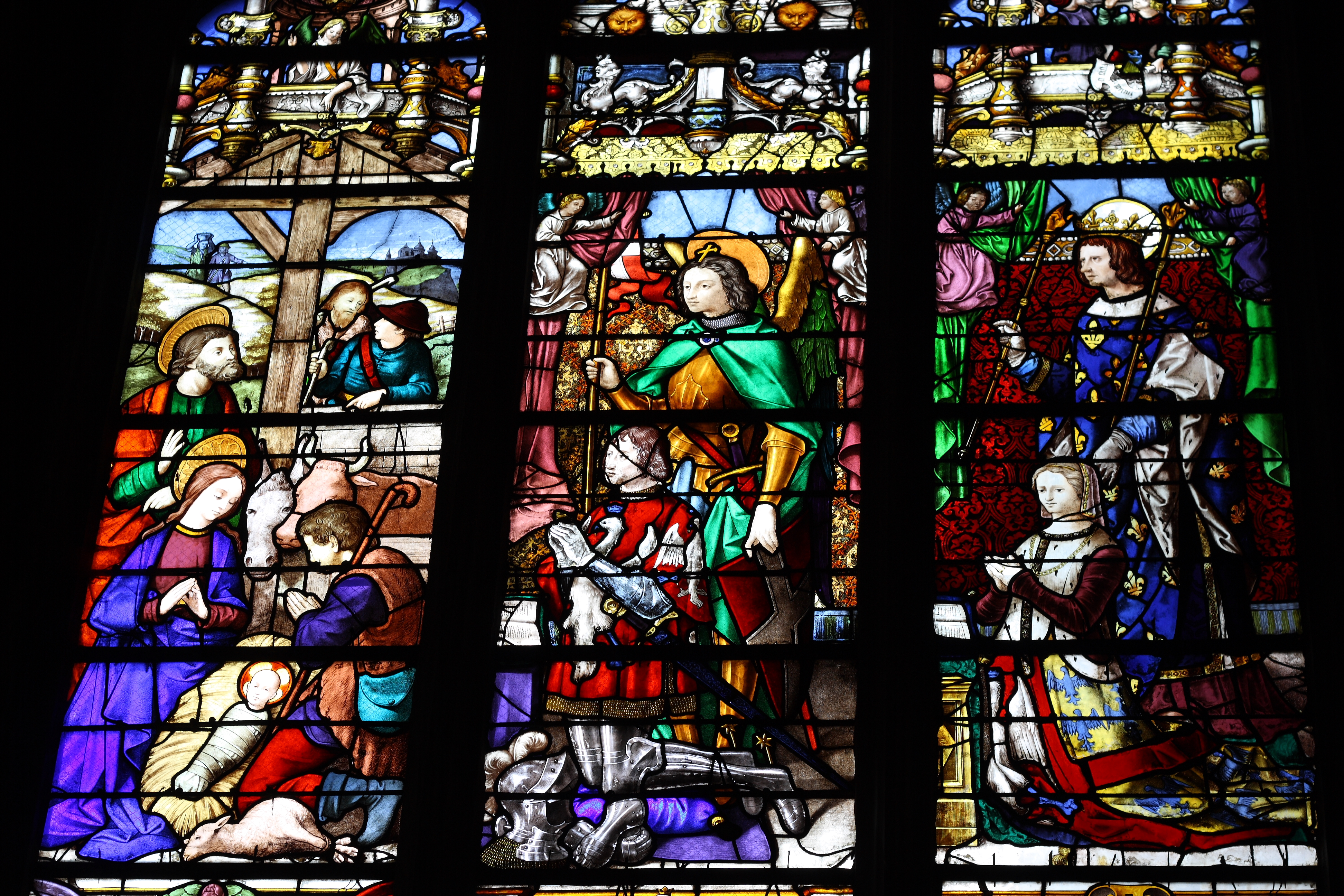 Ausschnitt des Bleiglasfensters Nr. 6 (19. Jahrhundert) in der katholischen Pfarrkirche Saint-Martin (Collégiale Saint-Martin) in Montmorency, Darstellung: Gaspard I. de Coligny (Mitte), Marie Louise de Montmorency (rechts) und Anbetung der Hirten (links) (siehe: Dominique Foussard, Charles Huet, Mathieu Lours: Églises du Val-d'Oise. Pays de France, Vallée de Montmorency, Société d'Histoire et d'Archéologie de Gonesse et du Pays de France, 2. Auflage, Gonesse 2011, ISBN 9782953155426)